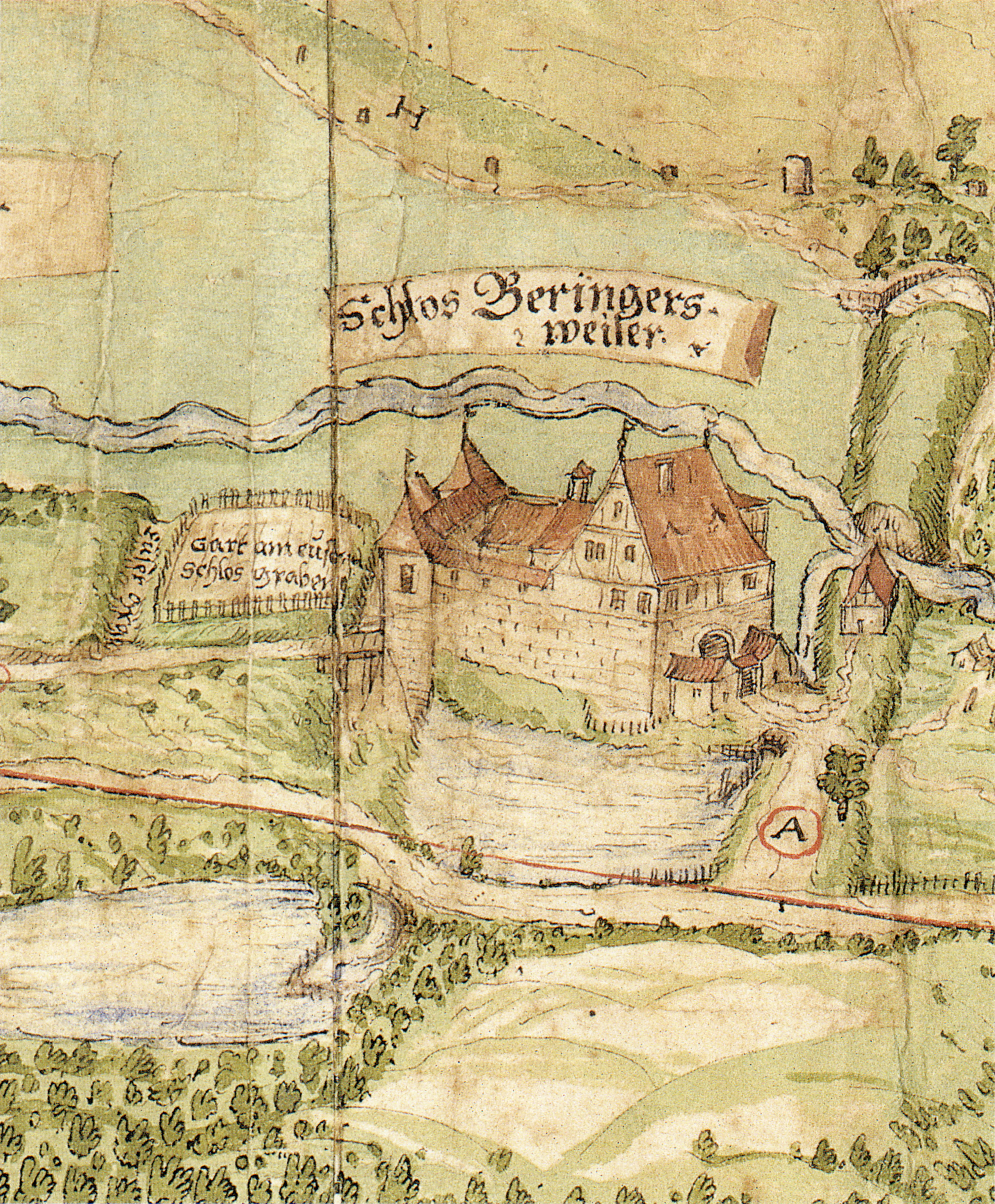 Das mittlerweile verschwundene Schloss Böhringsweiler bei Wüstenrot (heute auf Gemarkung der Gemeinde Großerlach) im 16. Jahrhundert